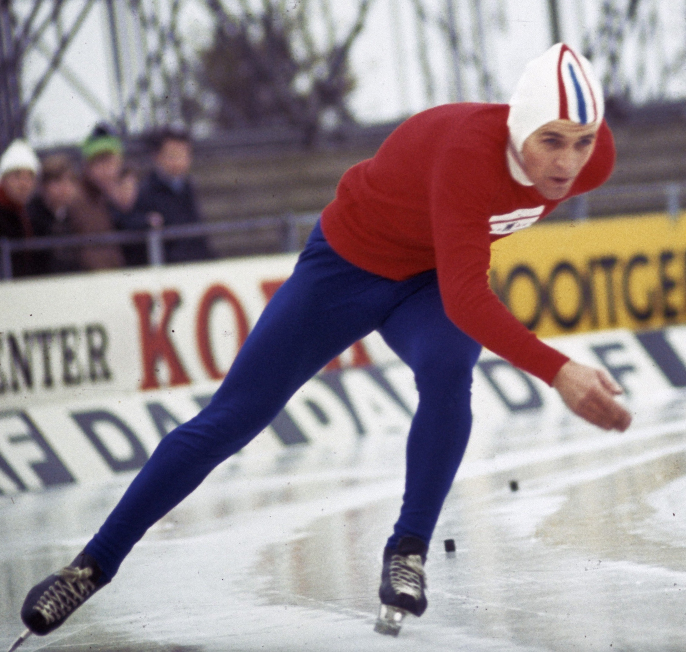 Schaatswedstrijden om de IJsselcup in Deventer. Jan Bols in aktie.